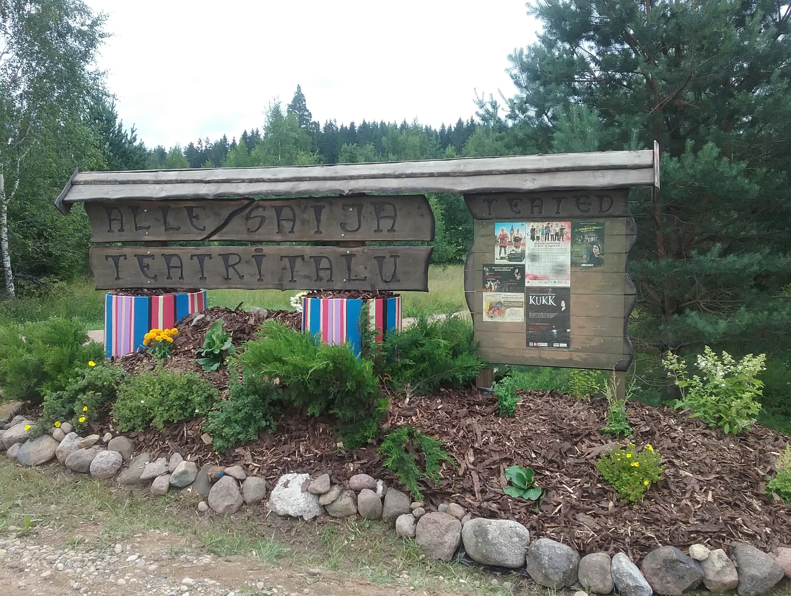 Alle-Saija Teatritalu viit